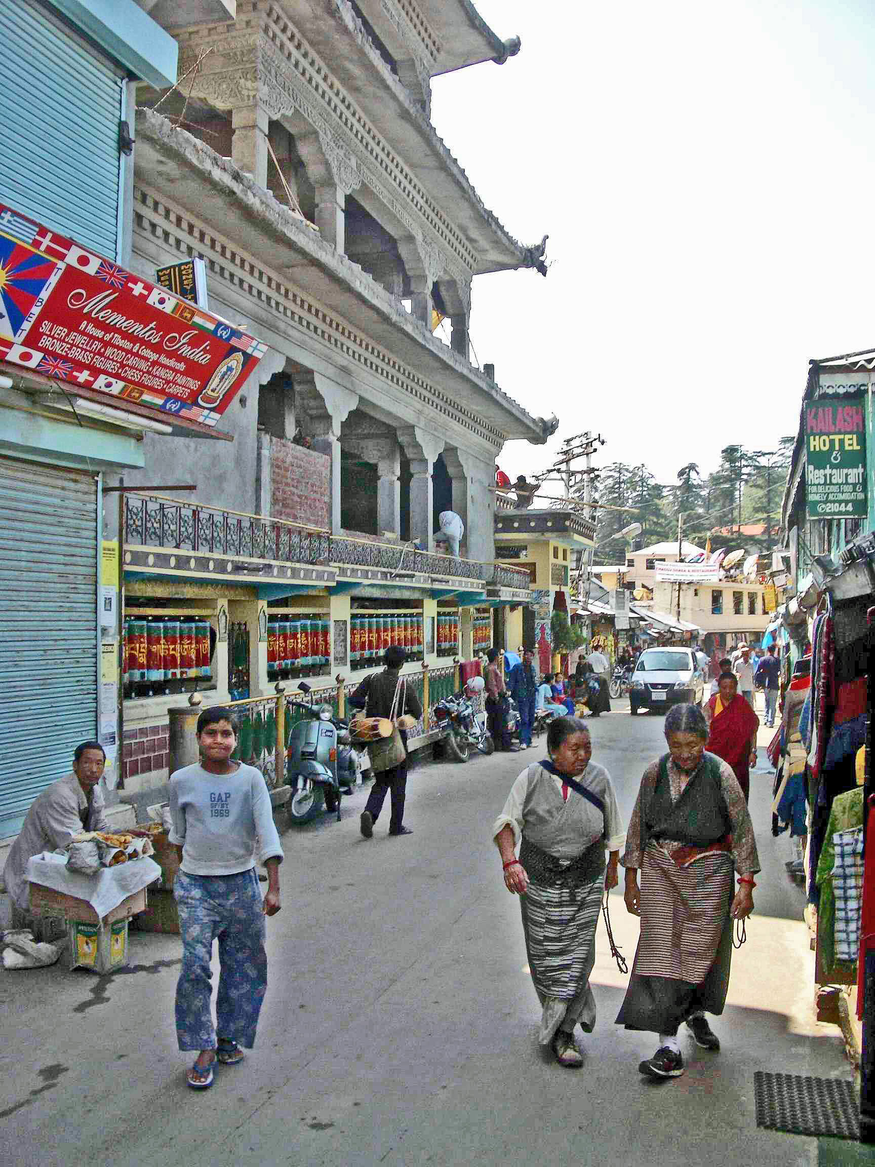 McLeod Ganj, Dharamsala, Himachal Pradesh, India